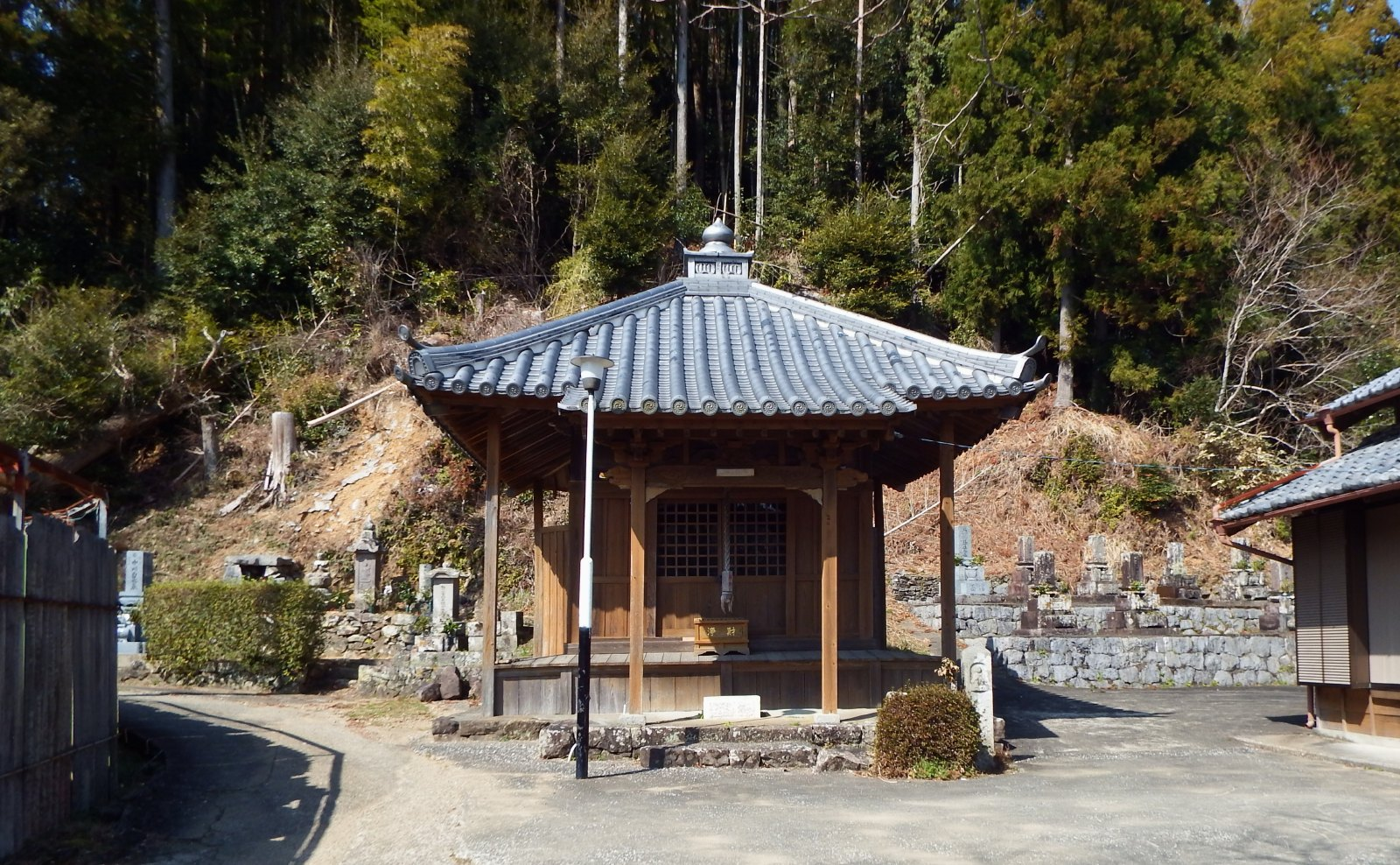 太龍寺からの「いわや道」の終点